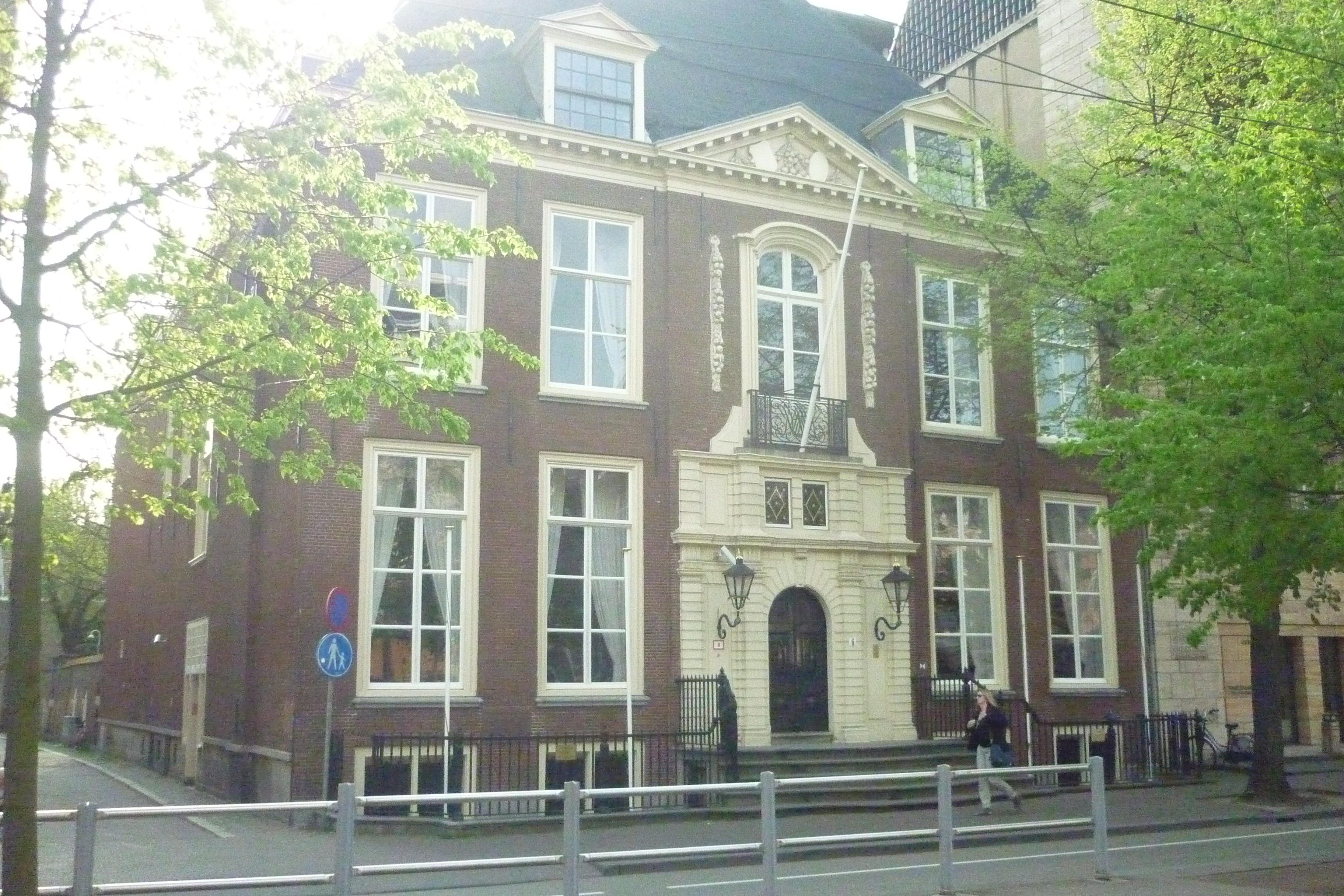 Kneuterdijk Johan de Witt-huis